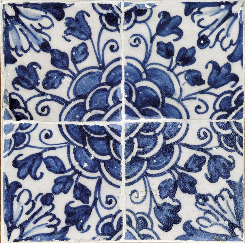 Painel de quatro azulejos